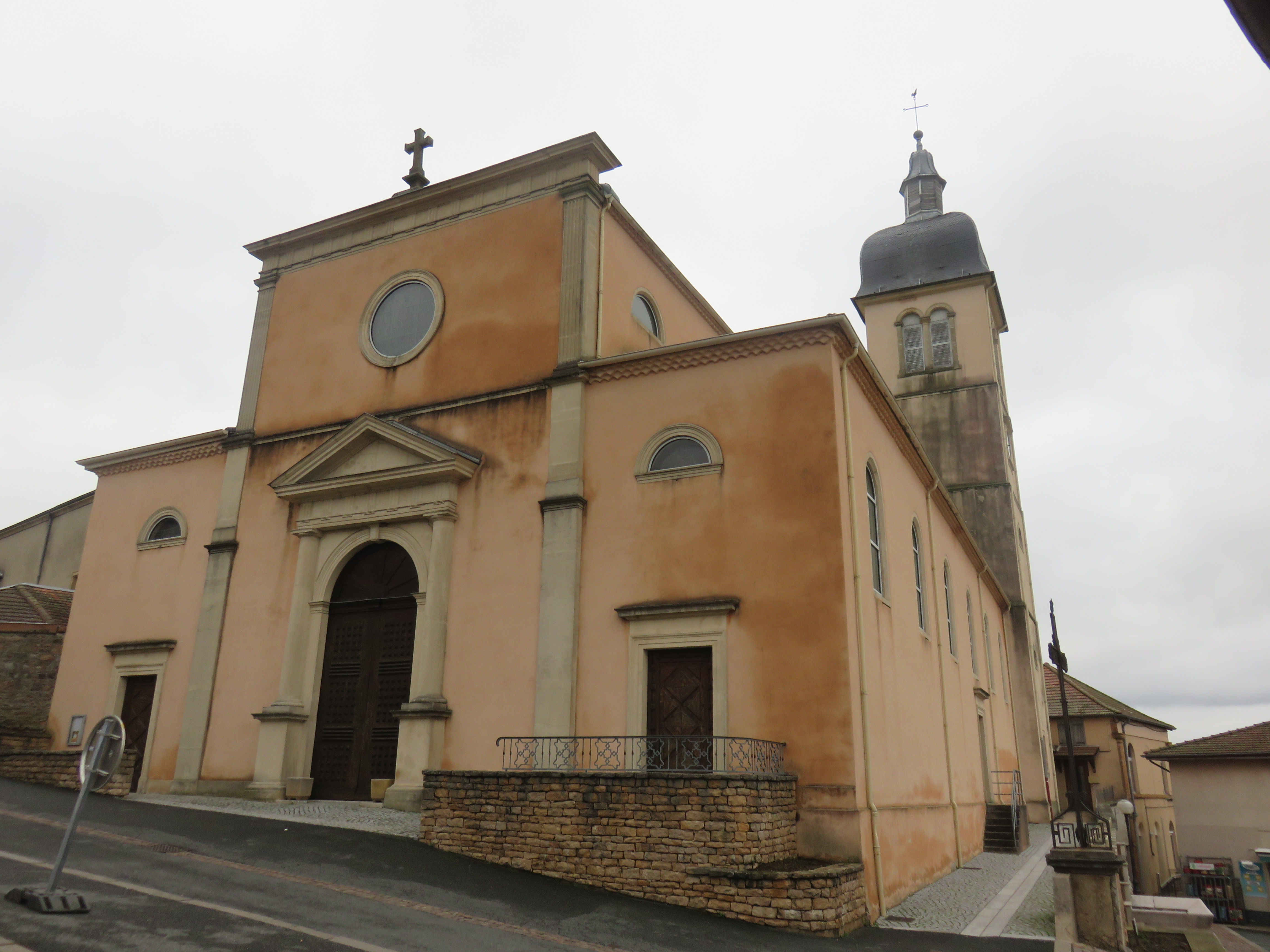 Façade de l'église de l'Assomption de Grandris (Rhône, France).